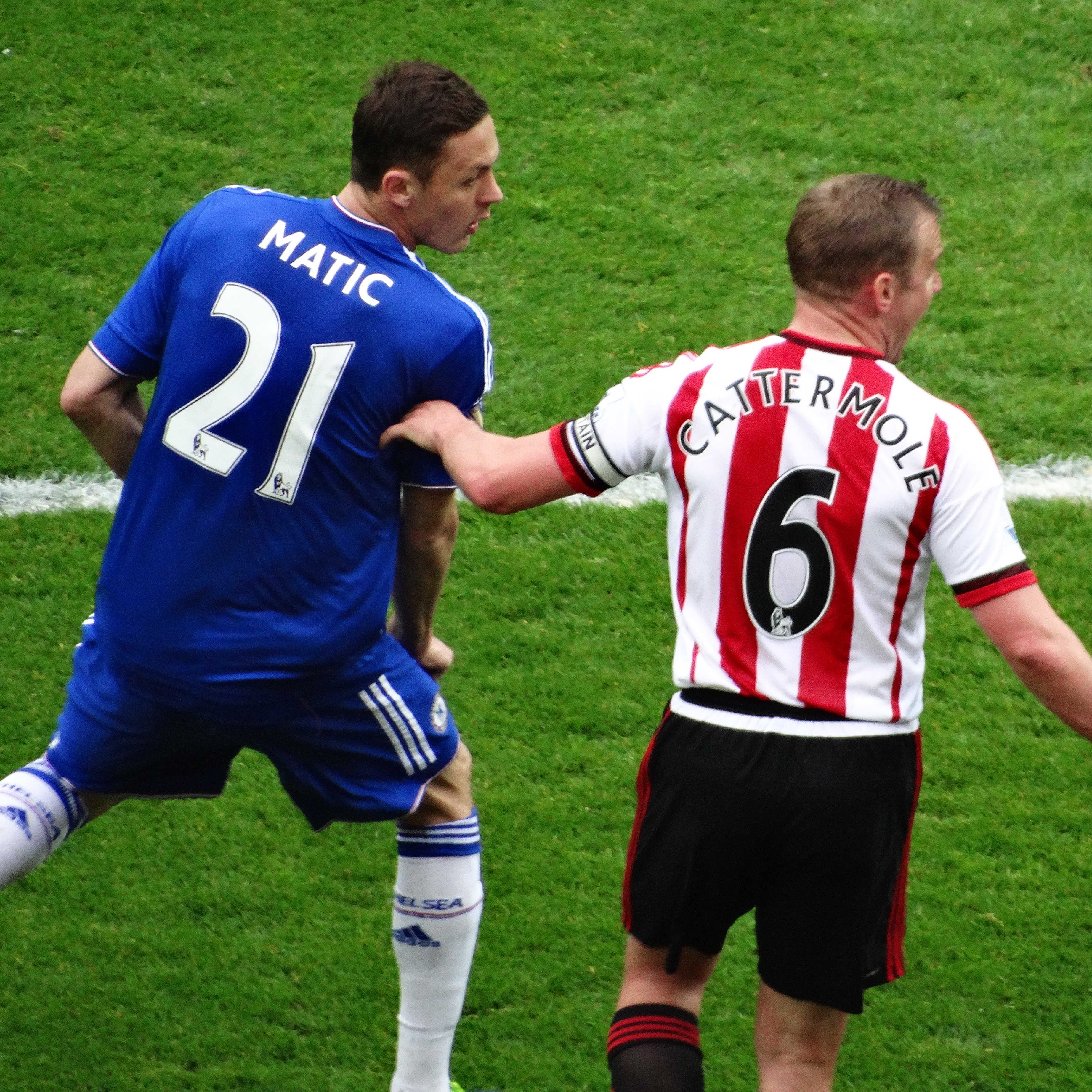 Sunderland 3 Chelsea2